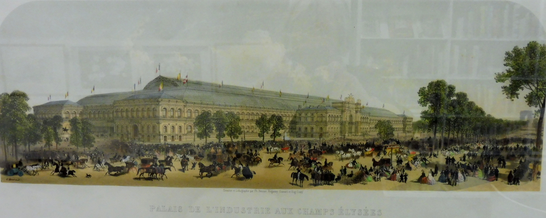 Façade du Palais de l'Industrie, 1855. Exposition Goupil, bibliothèque Flora Tristan à Bordeaux, été 2017 ː Félix Benoist, Louis Pierre Guillaume Régamey, Henri Guérard.